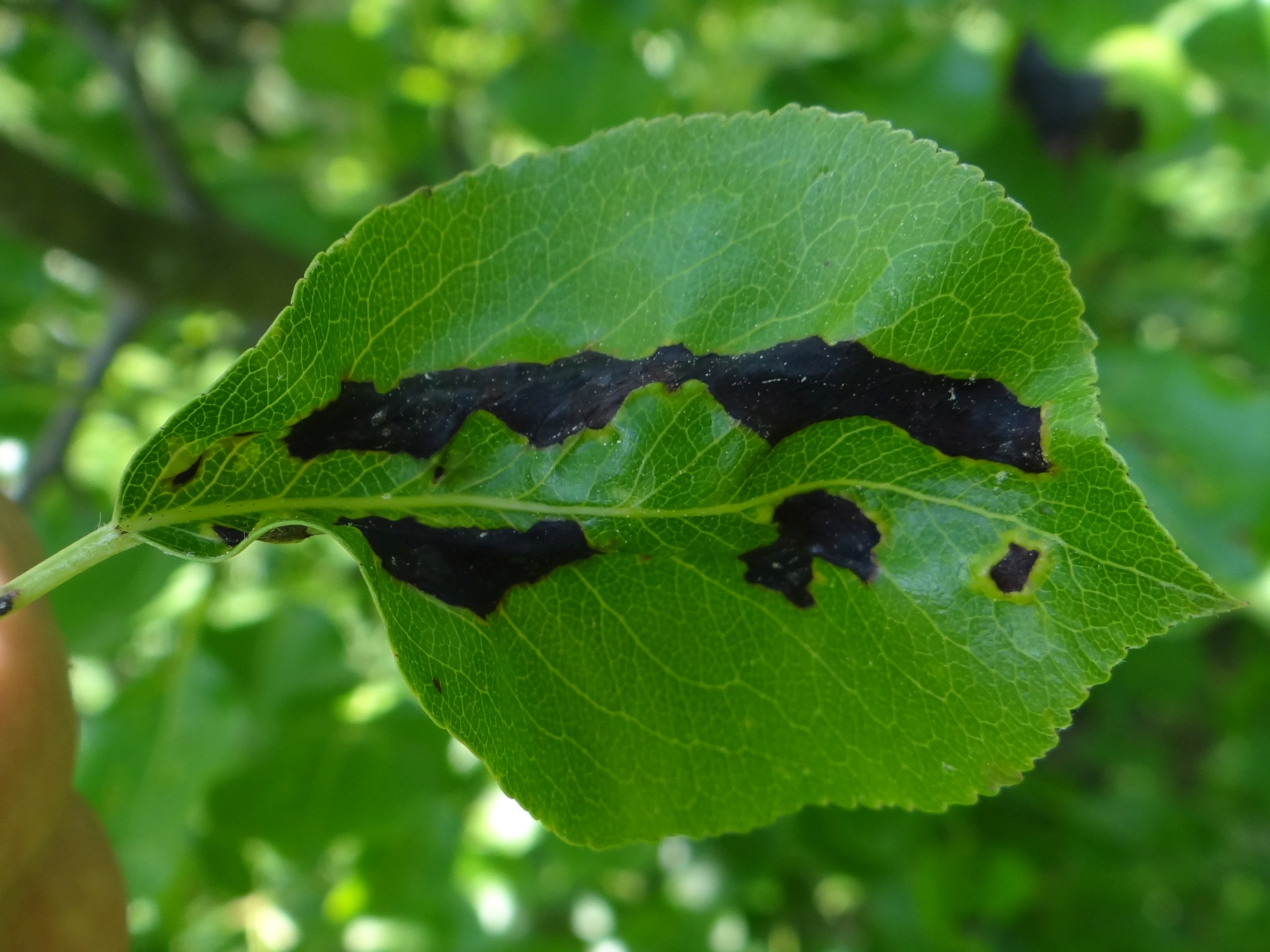 'Venturia pyrina on Pyrus communis. Location: Poland, Trzciana, województwo małopolskie